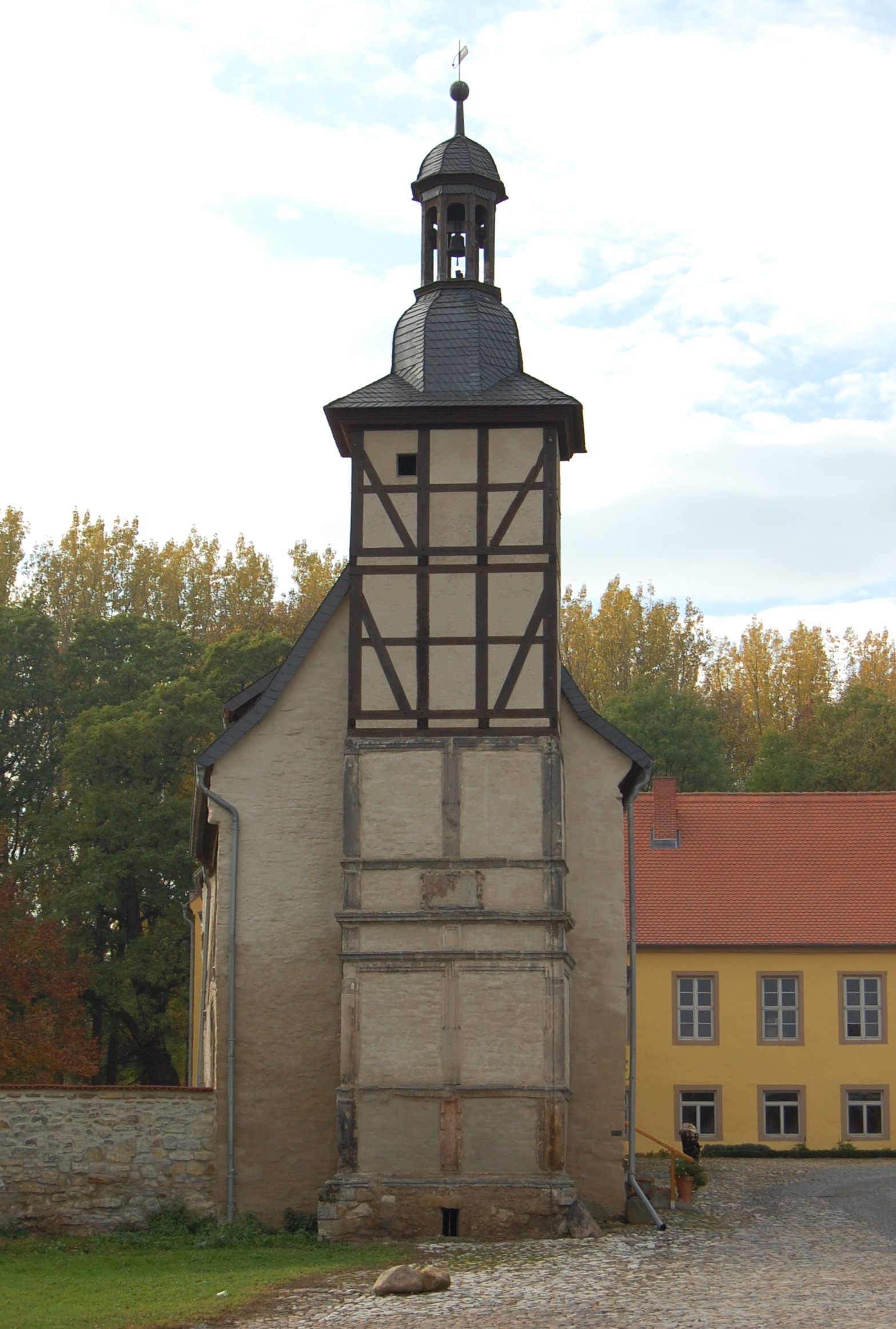 Turm vor der Kapelle der Komturei Bergen